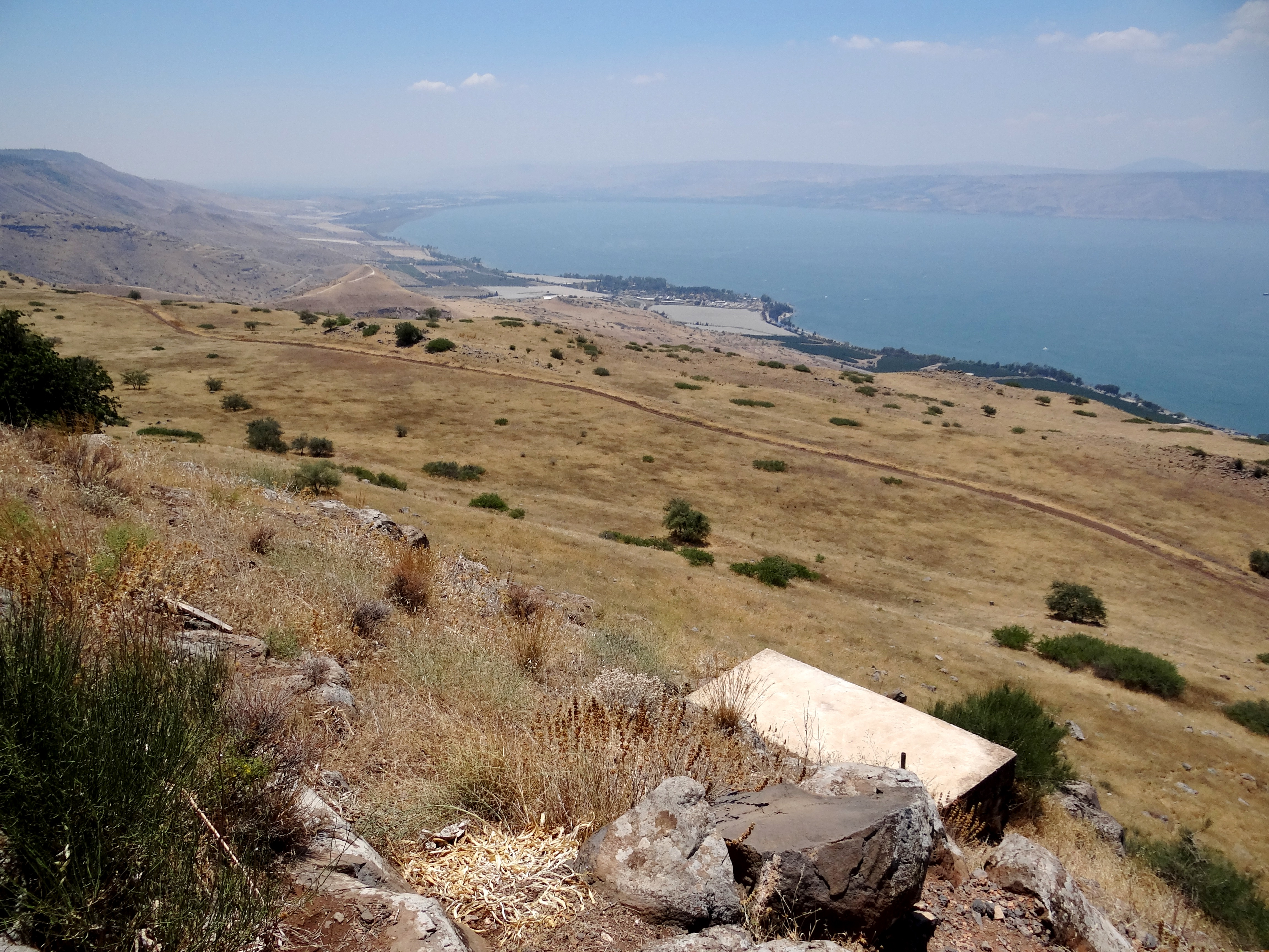 שרידי ביצורים סורי בשטח הכפר הסורי הנטוש סקופיה ברמת הגולן. היום בשטח של שמורת הטבע סוסיתה ליד מצפה אופיר הביצורים והכפר ניטשו בעקבות מלחמת ששת הימים.